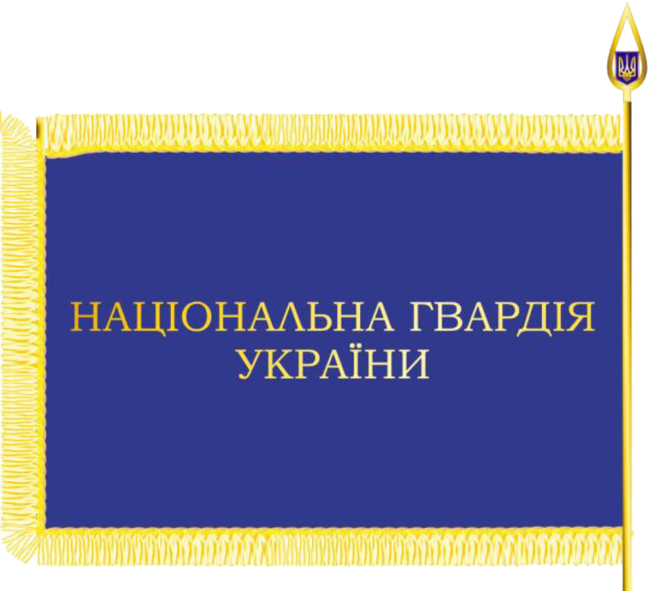 Прапор Національної гвардії України (реверс) Опис прапора Національної гвардії України Прапором Національної гвардії України є прямокутне полотнище синього кольору зі співвідношенням сторін 2:3, у центрі якого вміщено емблему Національної гвардії України. Висота емблеми дорівнює 2/3 висоти полотнища. Сторони прапора, крім лівого краю полотнища, прикрашено бахромою золотистого кольору. На зворотній стороні полотнища розташовано напис "НАЦІОНАЛЬНА ГВАРДІЯ УКРАЇНИ", виконаний літерами золотистого кольору. Древко прапора дерев'яне, темного кольору. Верхівка древка прапора стріловидна з жовтого металу, у центрі якої вміщено малий Державний Герб України.